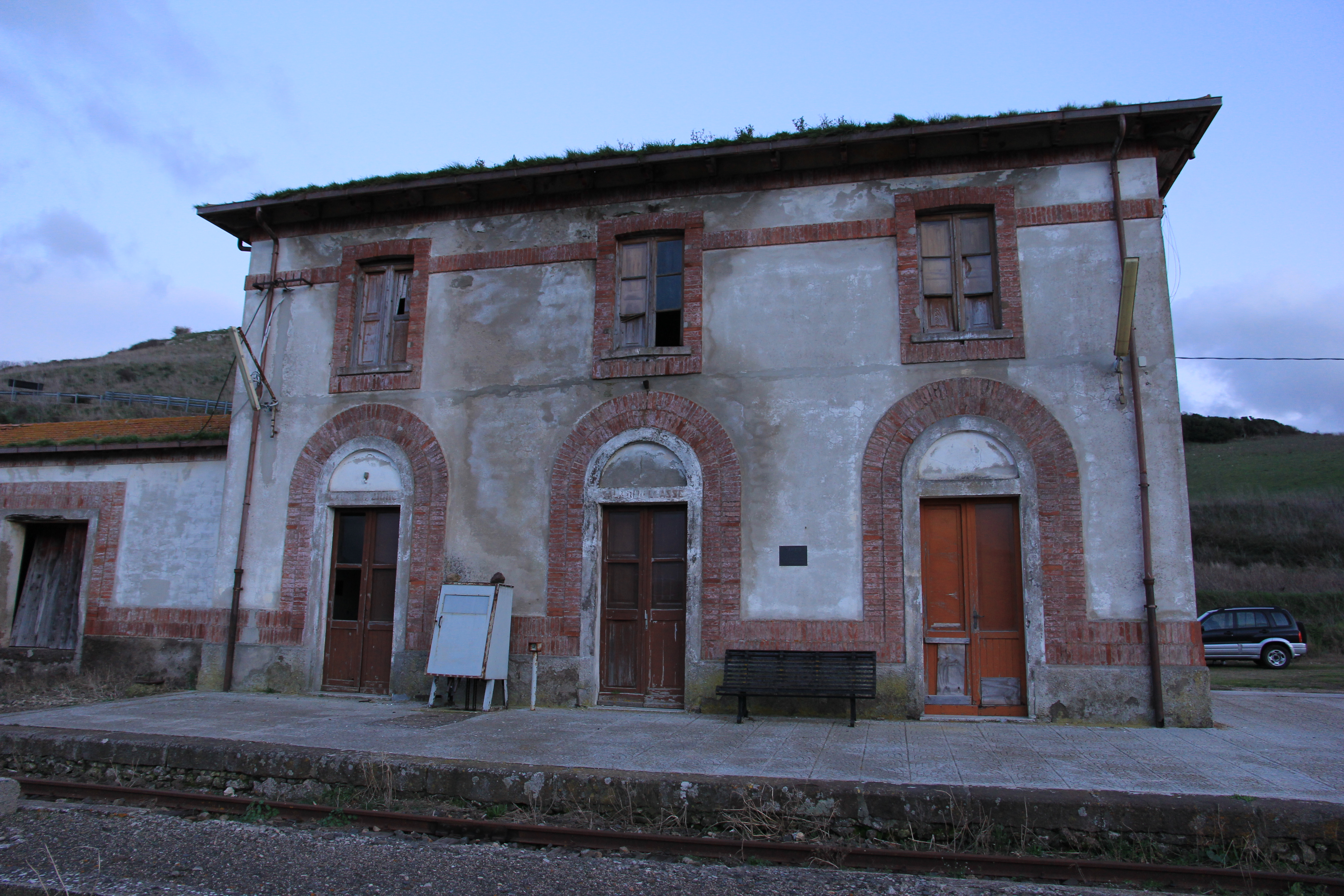 Martis - Stazione ferroviaria